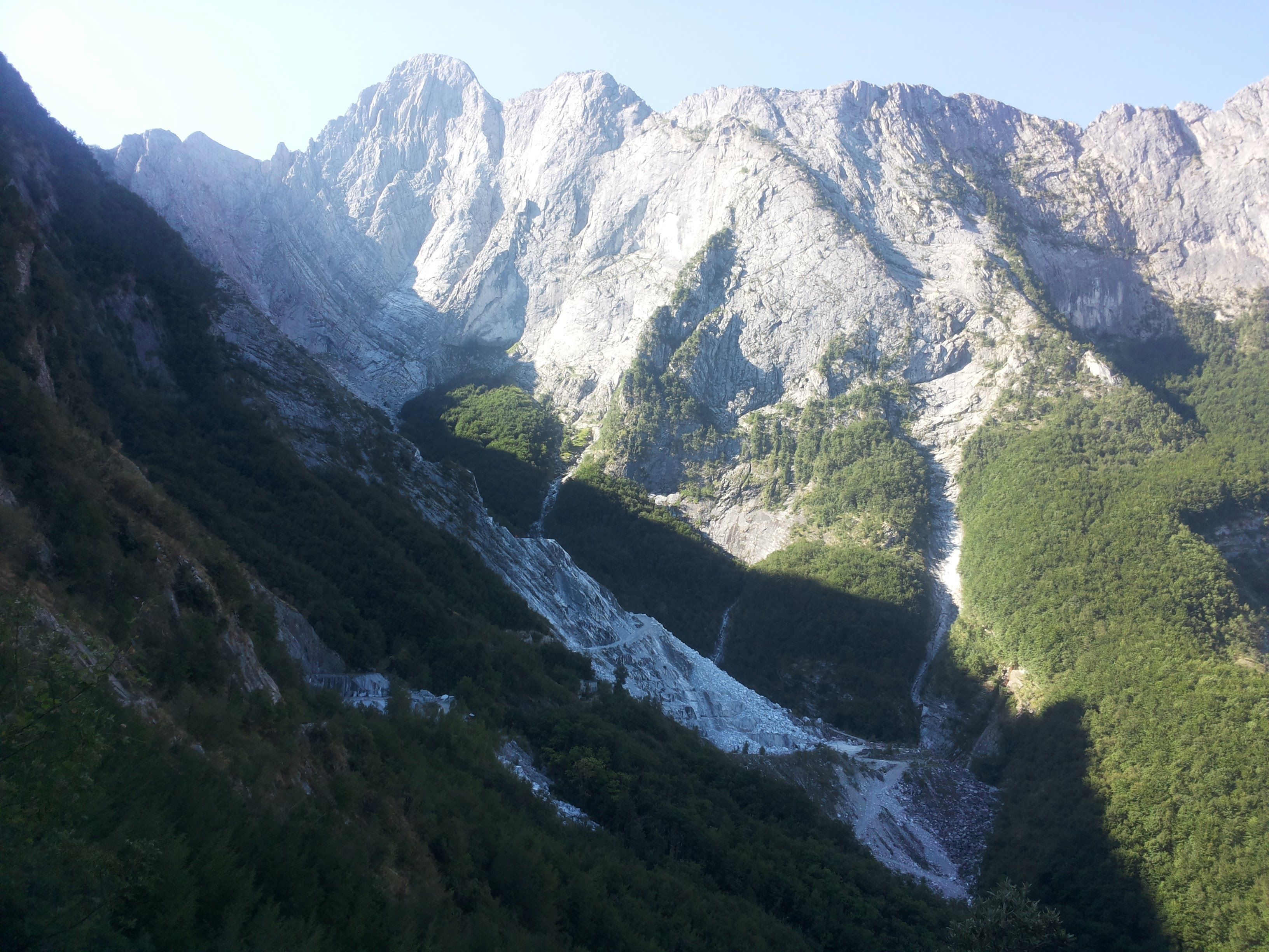 Pizzo d'Uccello (north face)